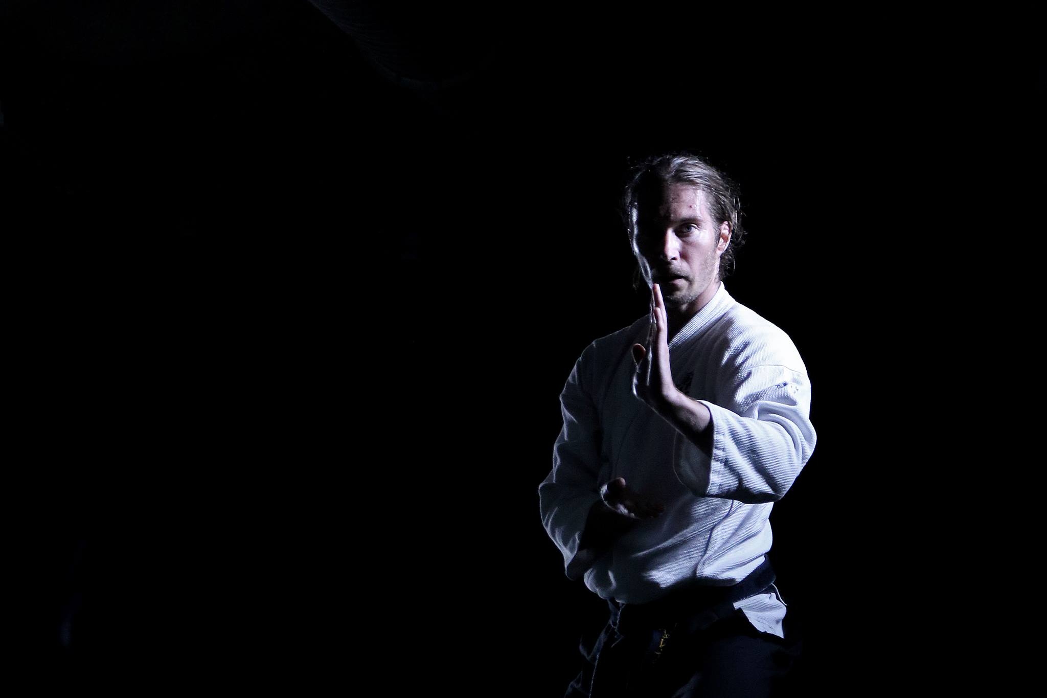 Jere Anttalainen